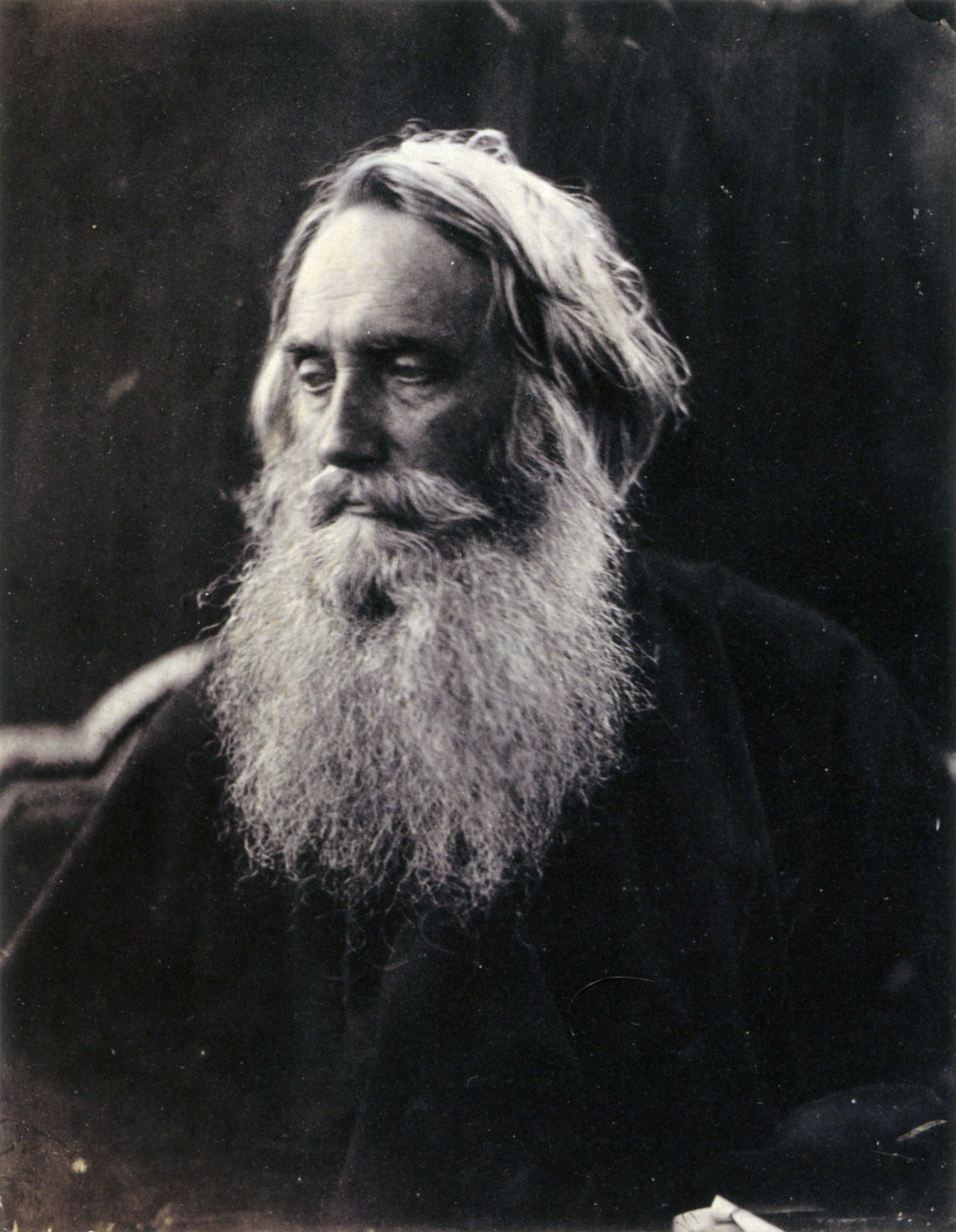 Henry Taylor Philip Van Artevelde. Albumen print, 270 x 209mm (10 5/8 x 8 1/4").